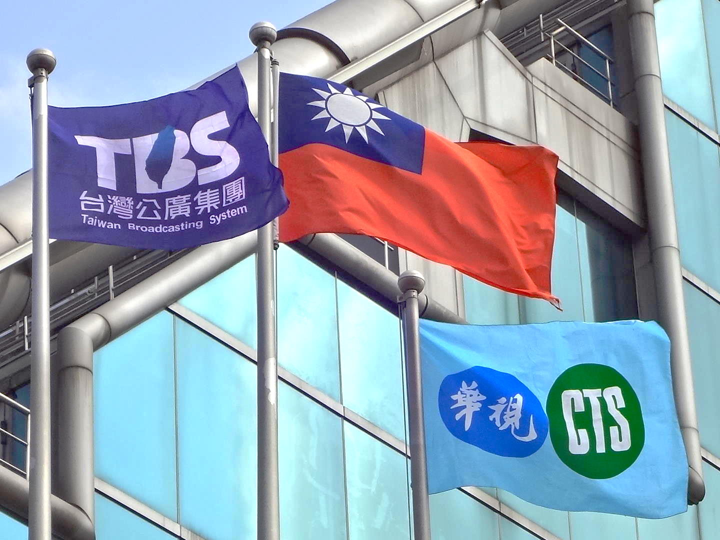 中華電視公司電視製作大樓右側旗桿，懸掛台灣公共廣播電視集團旗（左）、中華民國國旗（中）與華視旗（右）各一面。2016年10月31日重訪時，台灣公共廣播電視集團旗的位置改掛第二面華視旗。